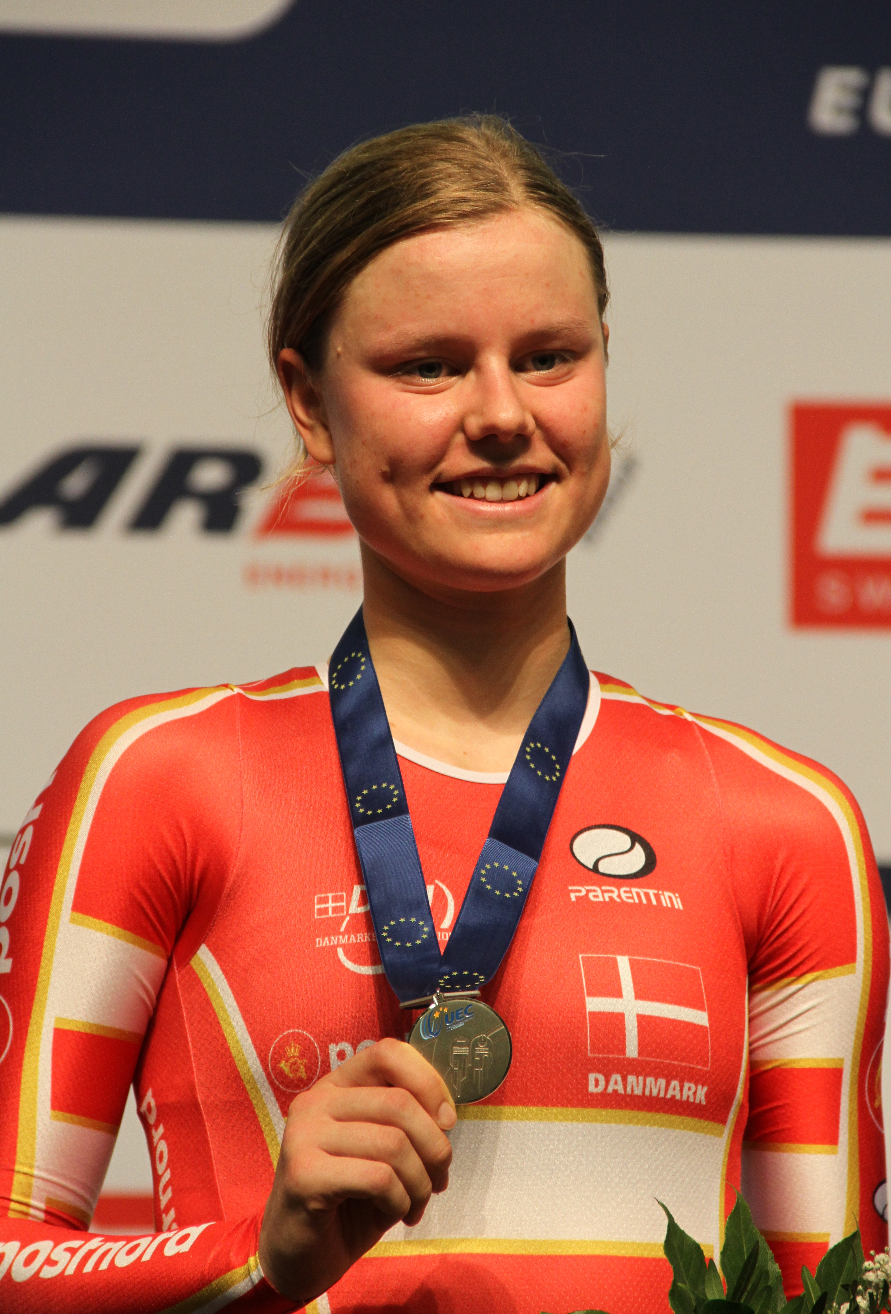 Amalie Dideriksen, dänische Radsportlerin, Silbermedaille im Omnium The making of this document was supported by the Community-Budget of Wikimedia Germany.